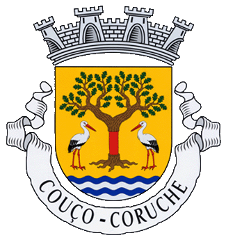 Brasão da Vila do Couço!